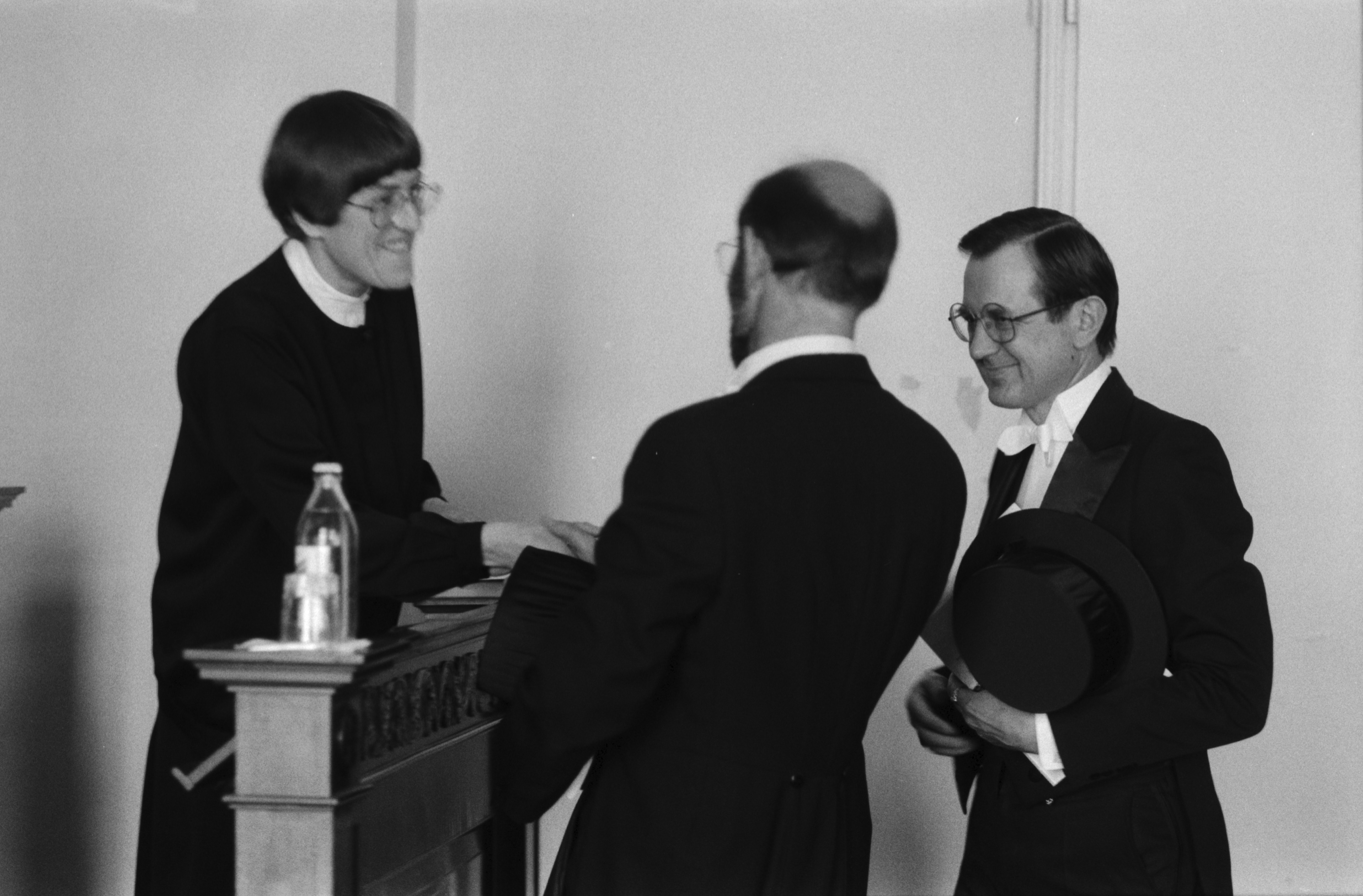 Filosofian lisensiaatti Eeva Maija Viljon väitöstilaisuus Helsingin yliopiston päärakennuksessa on päättynyt. Opponenttina toiminut Helsingin yliopiston taidehistorian professori Henrik Lilius ja kustoksena toiminut ruotsinkielisen historia-oppituolin professori Matti Klinge onnittelevat väittelijää. – Väittelijän puvun suunnitteli ja valmisti tekstiilitaiteilija Stina Berger, hiusmuotoilijana toimi kampaaja Pirkko Merenmies.